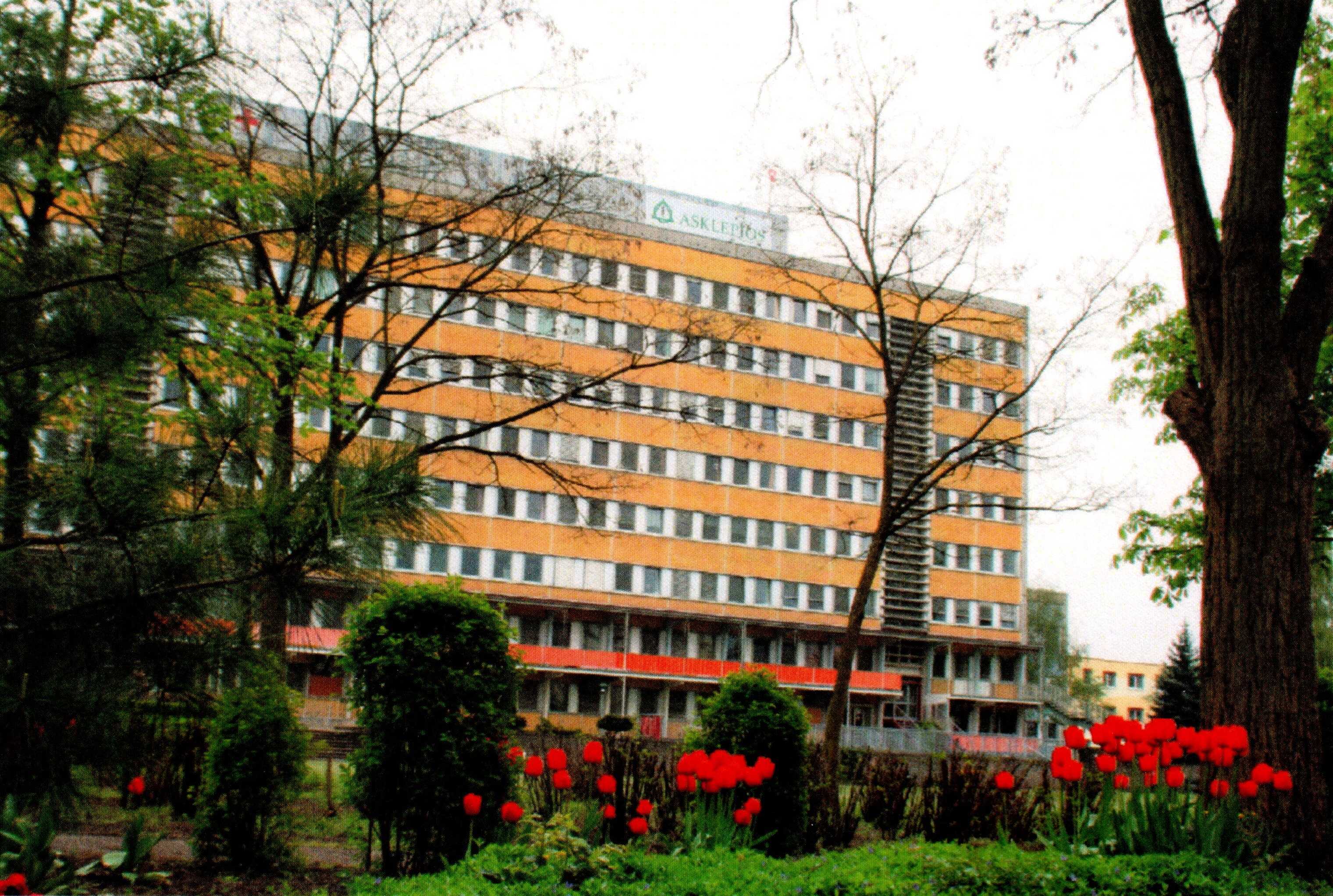 Asklepios Klinikum Uckermark, Schwedt/Oder, ehemaliger Patientengarten und Klinikhochhaus von West-Nord-West